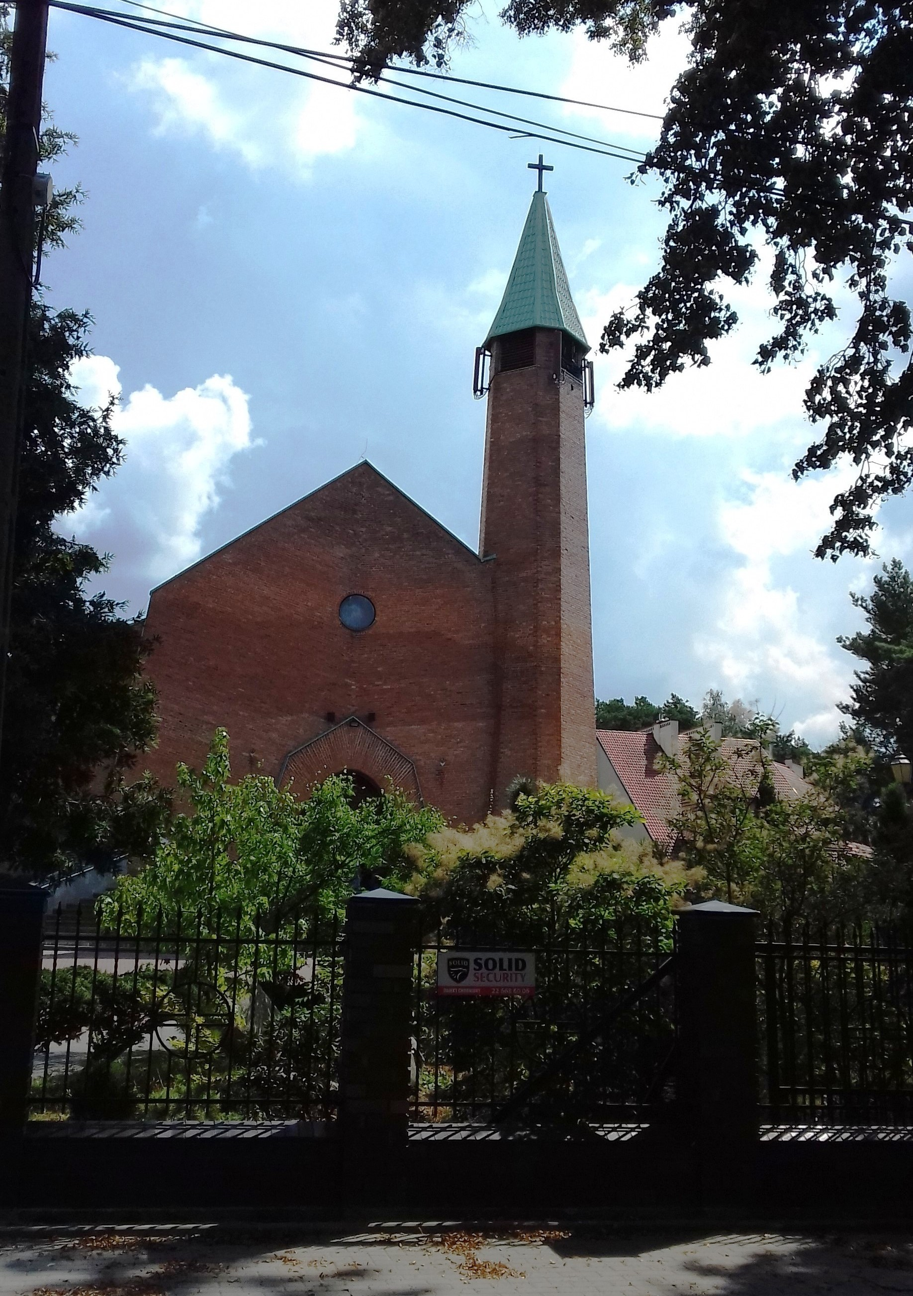 Otrębusy (gm. Brwinów, pow. Pruszków) - kościół NMP Matki Kościoła